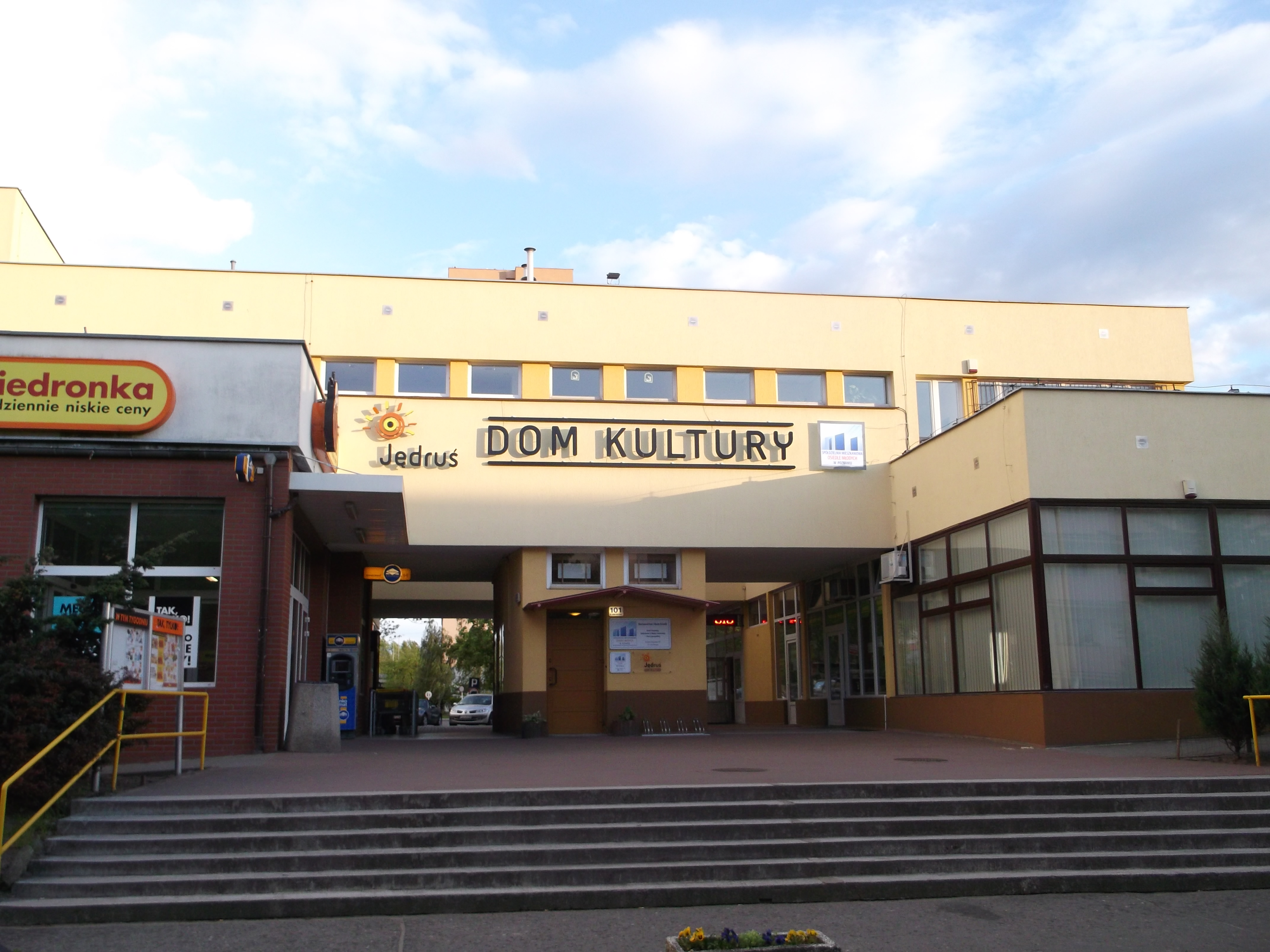 Osiedle Armii Krajowej w Poznaniu.